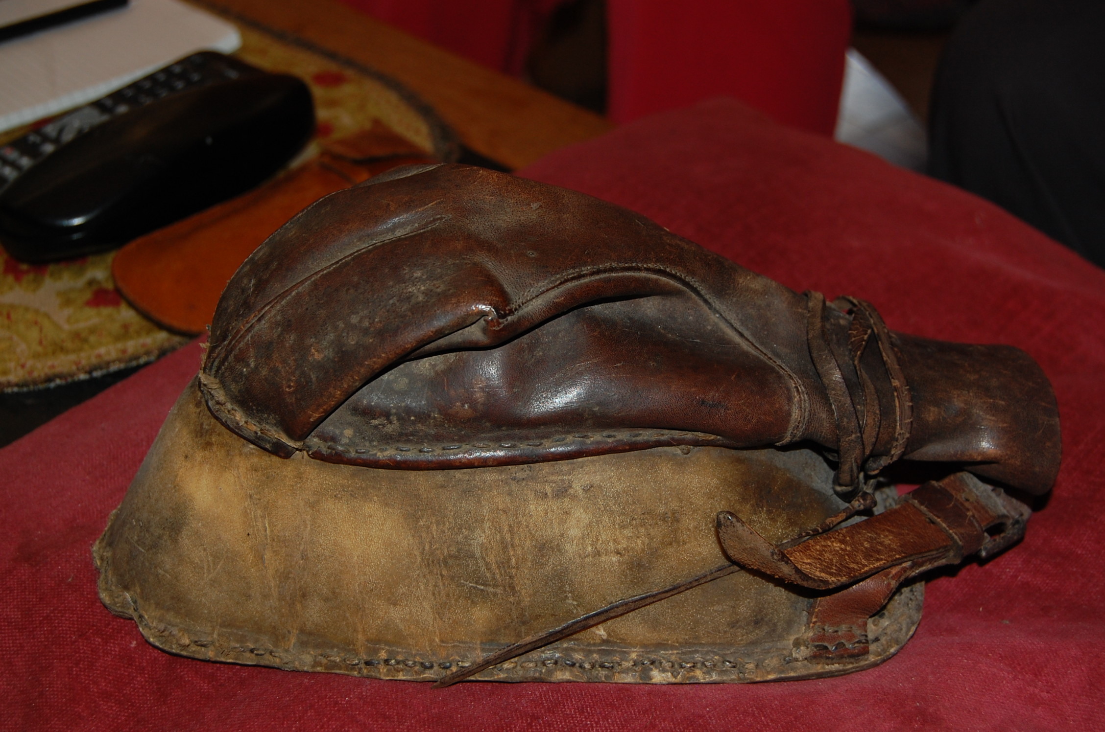 Walon: want del pitite bale å tamis (dizeu, po stitchî s' mwin), diné a Willy Leroy pa on djouweu ki djouwéve a Brussele, plaece Jourdan, diviè 1965.